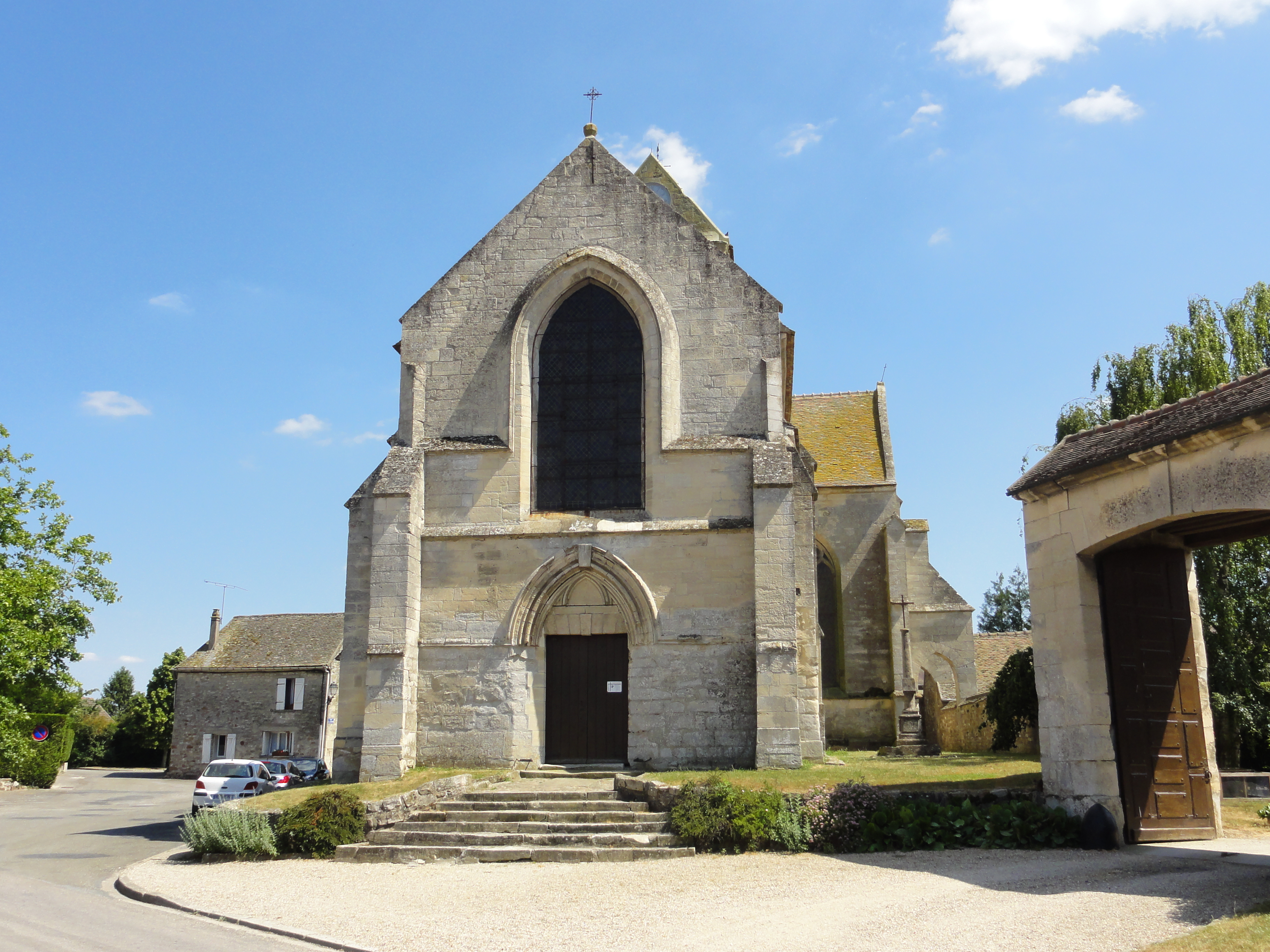 Église Sainte-Marie-Madeleine, Le Bellay-en-Vexin, France.